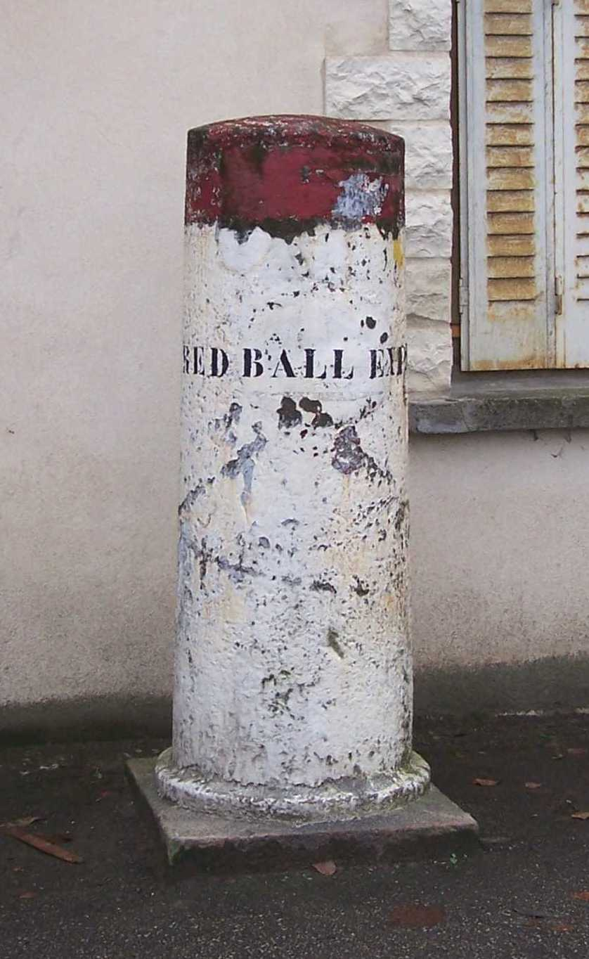 Borne commémorative du Red Ball Express à La Queue-lez-Yvelines (Yvelines, France)